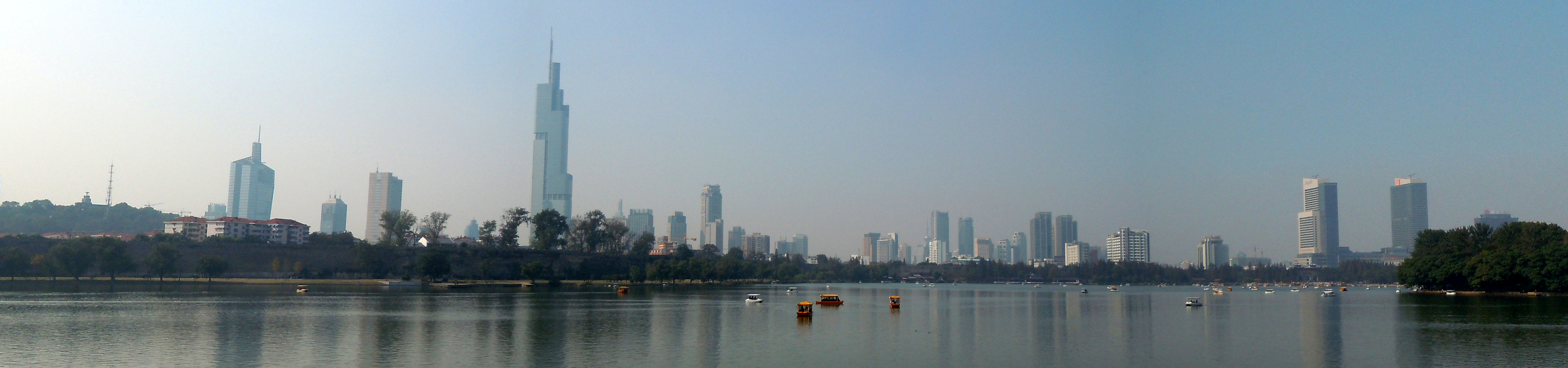 玄武湖望南京天际线